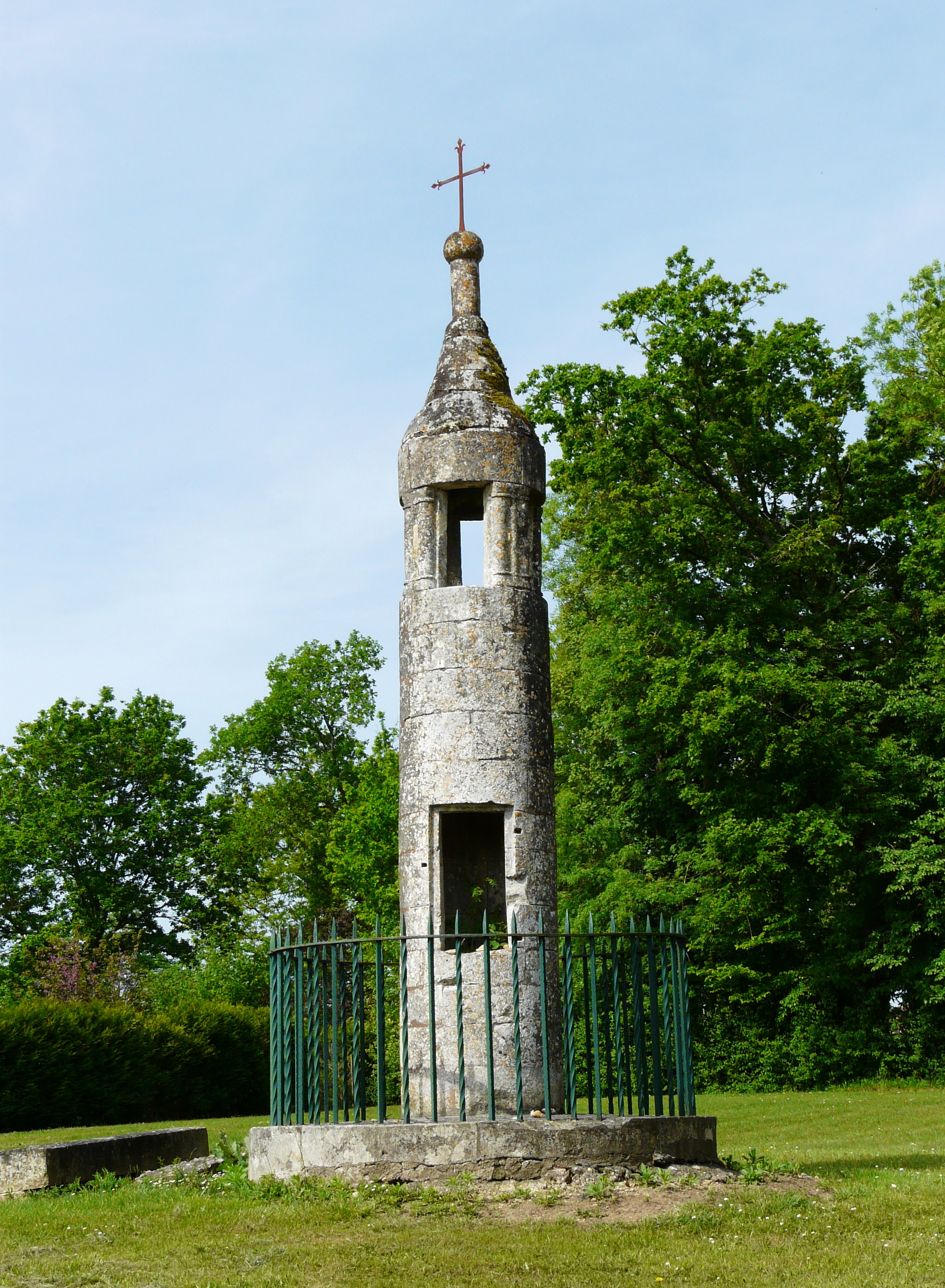 Lanterne des morts d'Atur, Dordogne, France Object location45° 08′ 22.9″ N, 0° 45′ 04.7″ E .